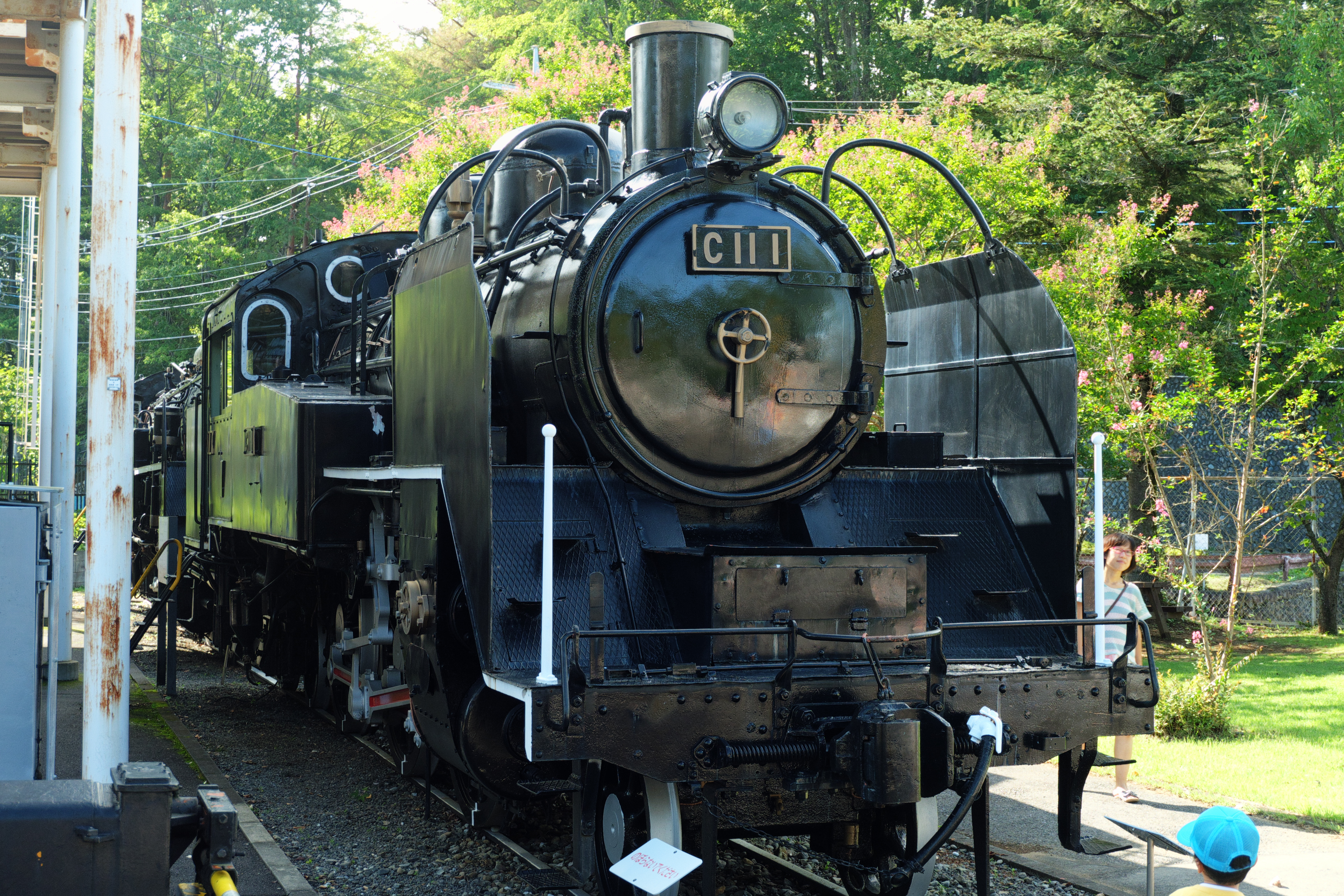 国鉄C11形1号蒸気機関車（青梅鉄道公園にて撮影）